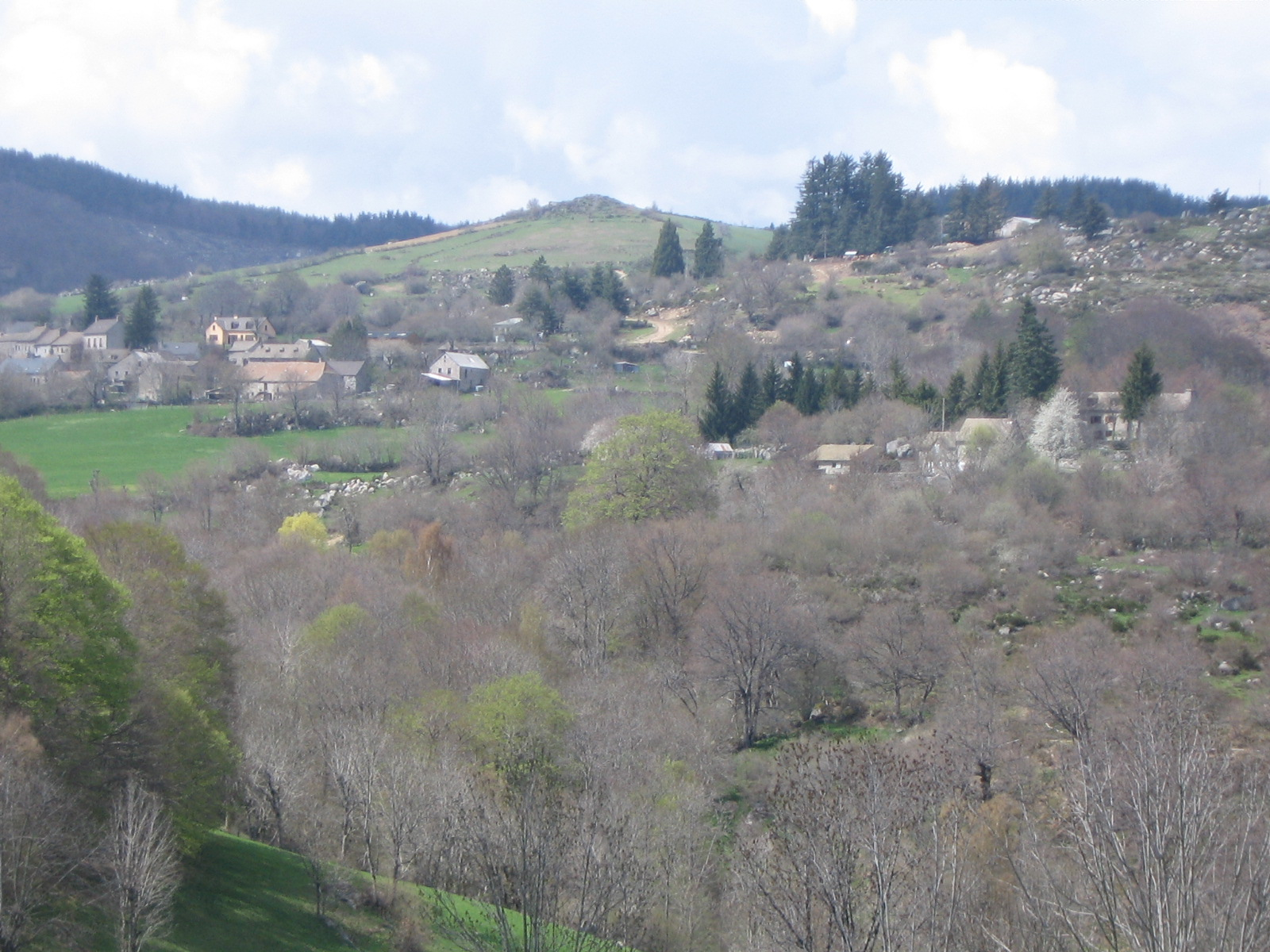 le Mas de Muret